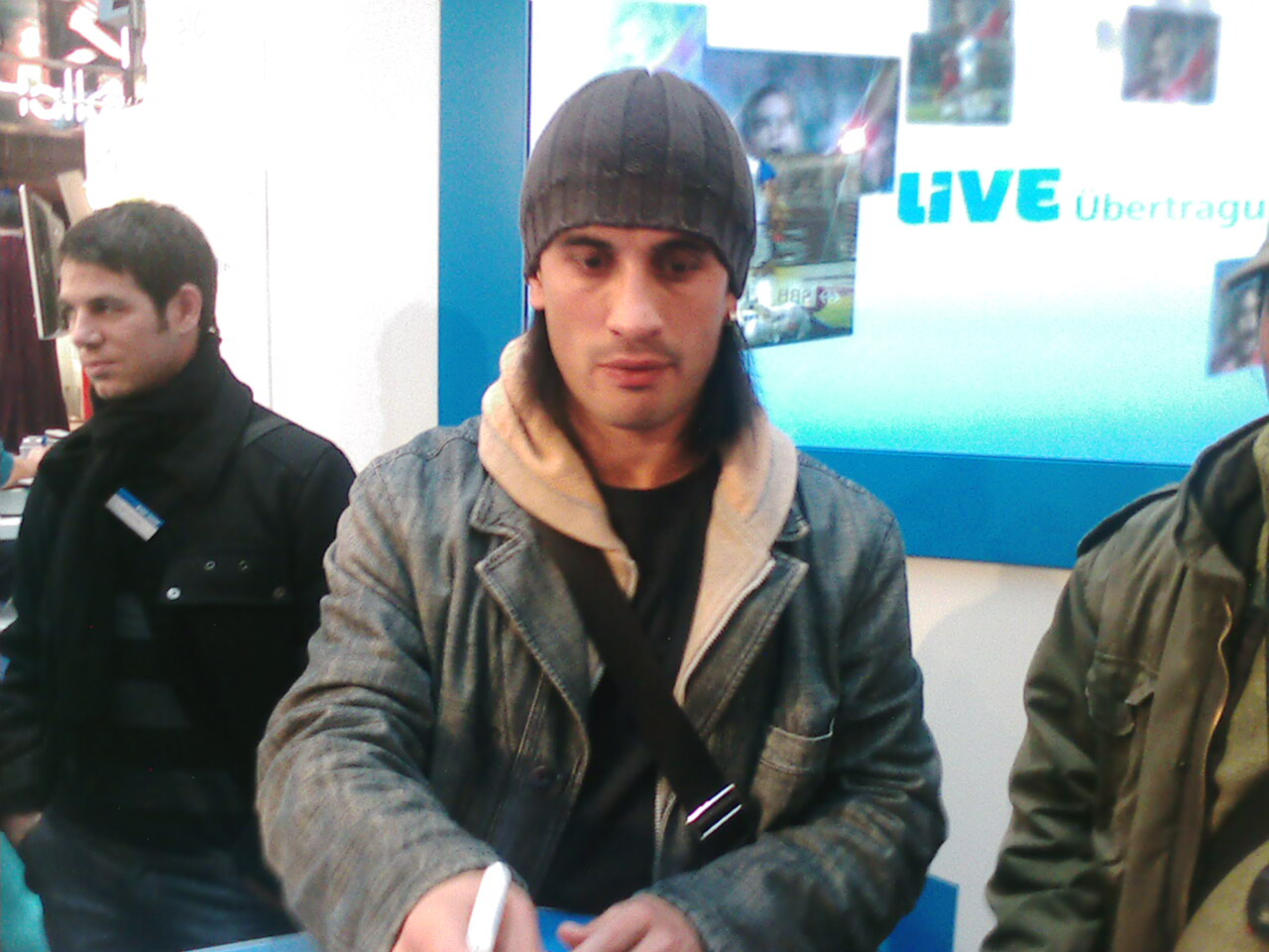 Hakan Yakin